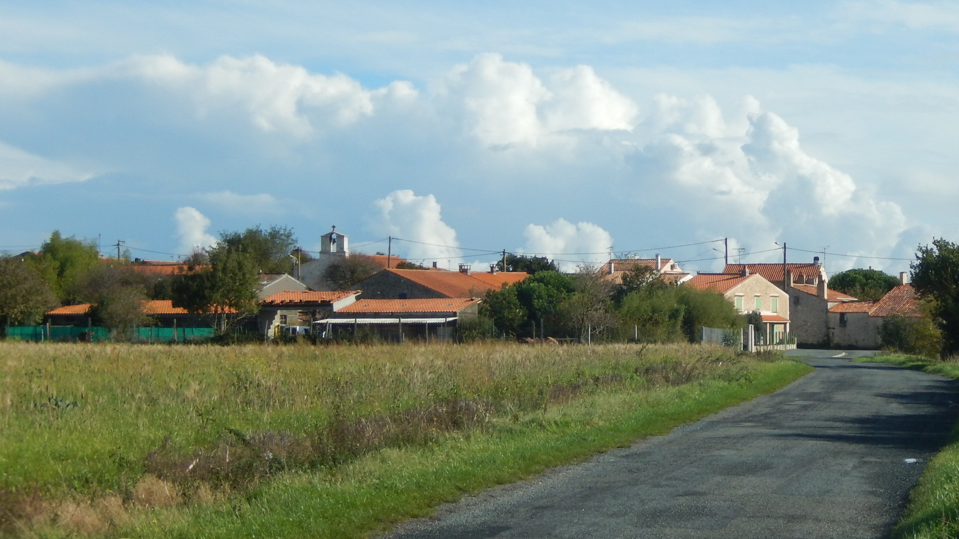 Saint-Froult, Charente-Maritime, France. • Le village de Saint-Froult, vu par la Route des Claires. On distingue le clocher de l'église du village.